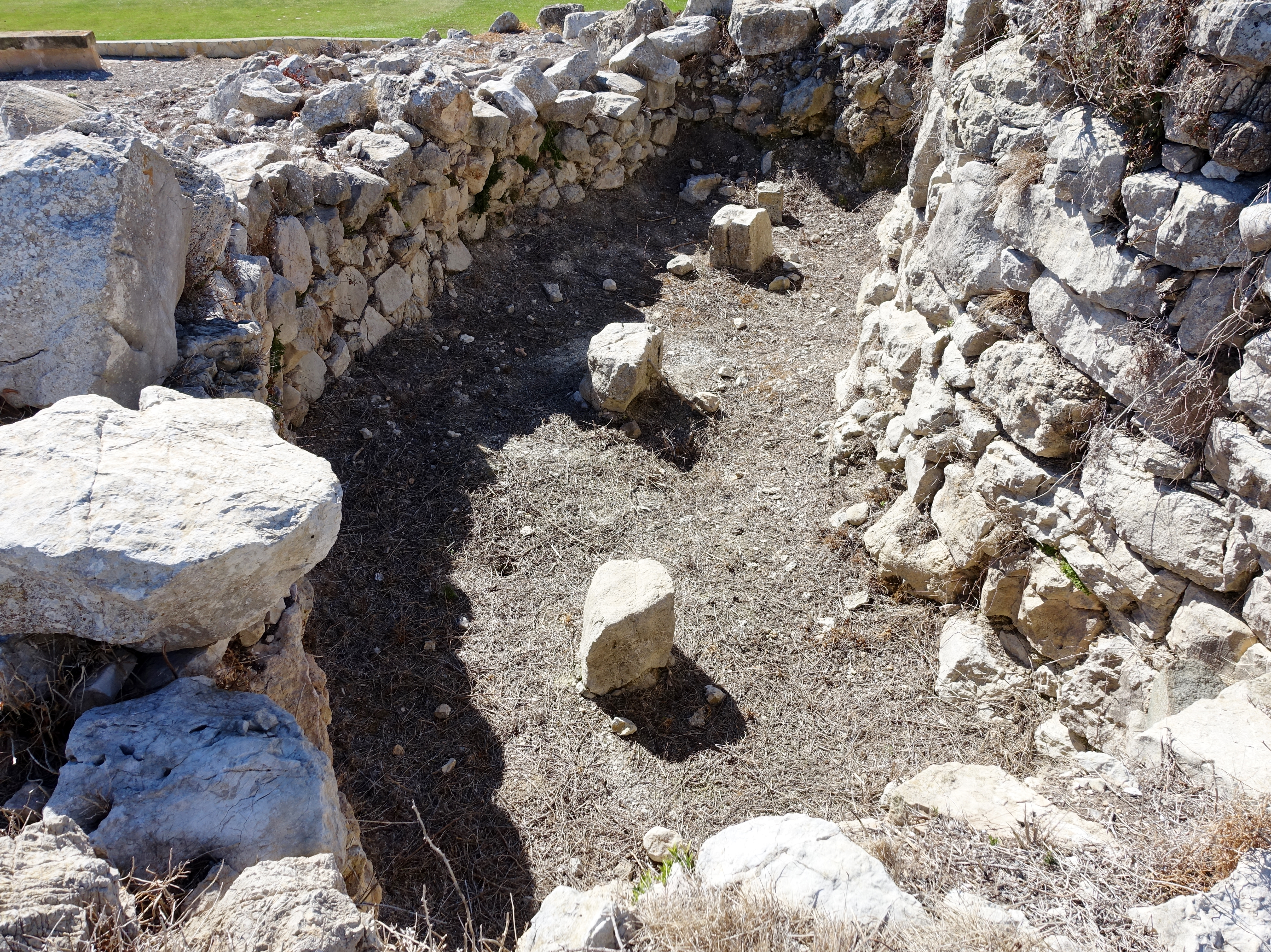 Talaiot von Pula, Gemeinde Son Servera, Mallorca, Spanien